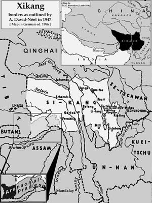 Administrativer Raum der ehemaligen chinesischen Provinz Xikang